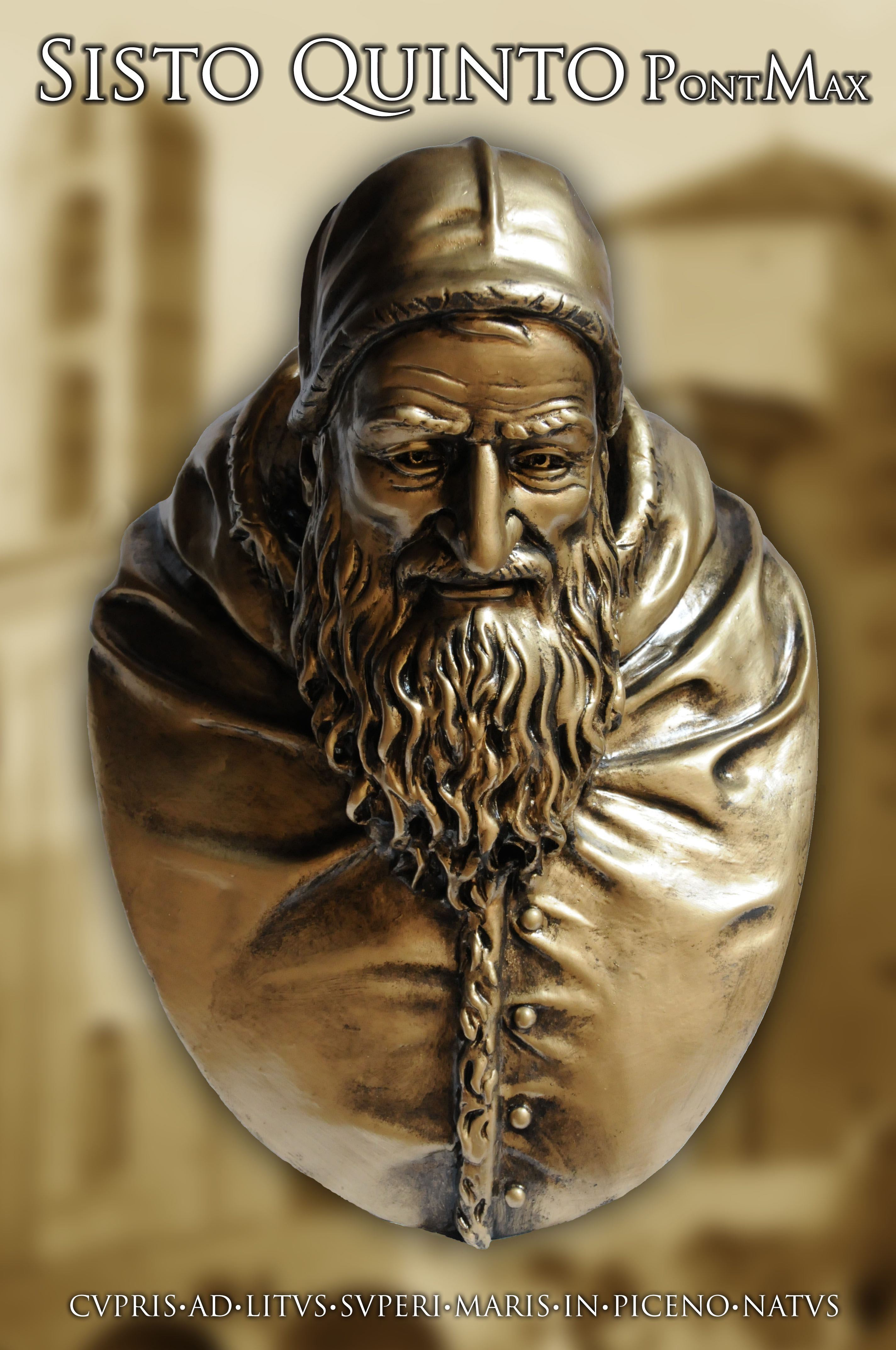 Opera i Ubaldo Ferretti